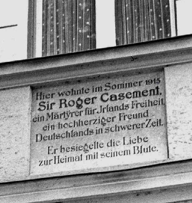 Wandtafel am Hauswand wo Roger Casement 1915 in Riederau am Ammersee, Nähe München, wohnte. Casement war dort mit Manfred Curry eng befreundet.